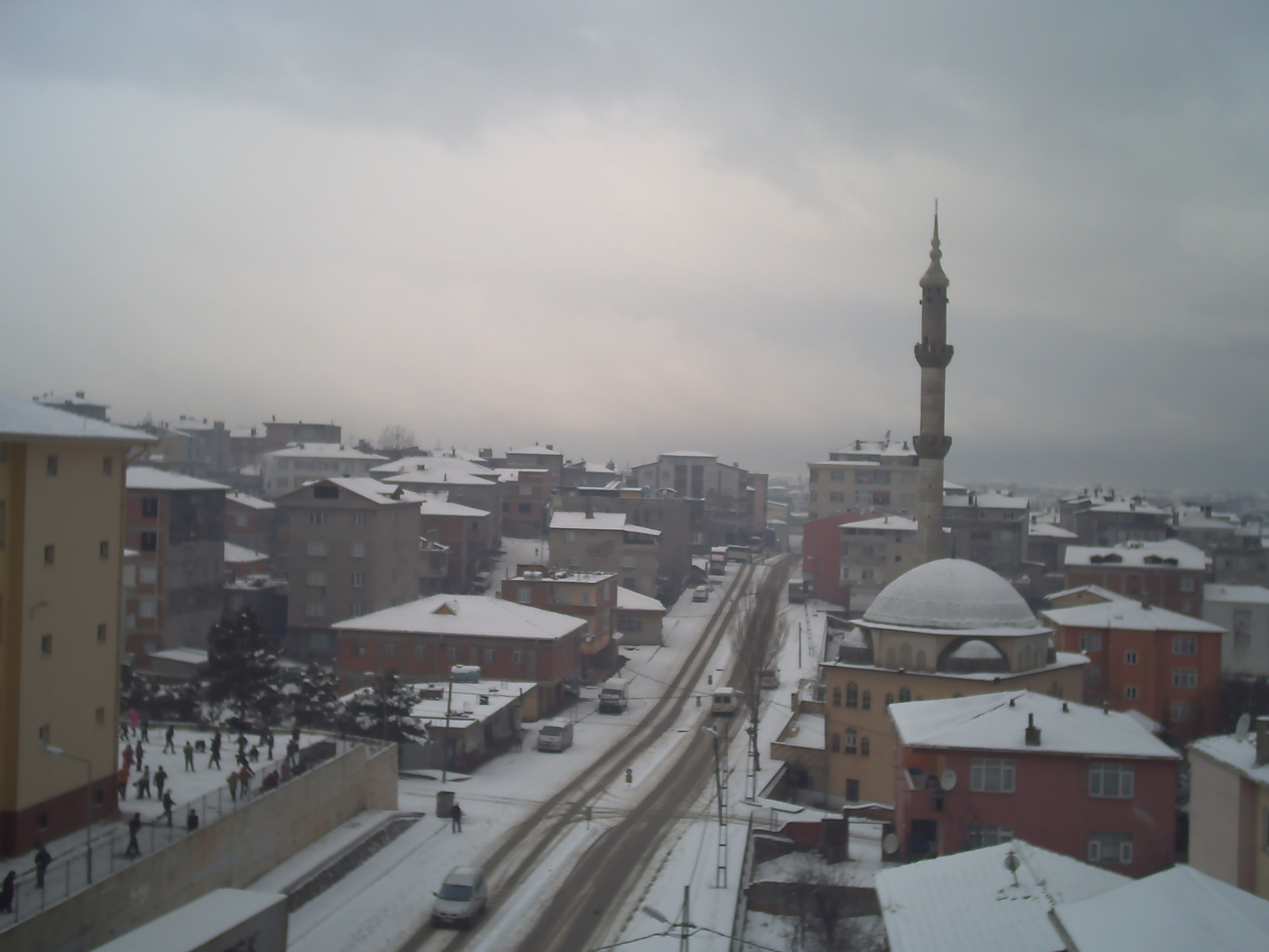 Sultanbeyli, Sultanbeyli/İstanbul, Turkey